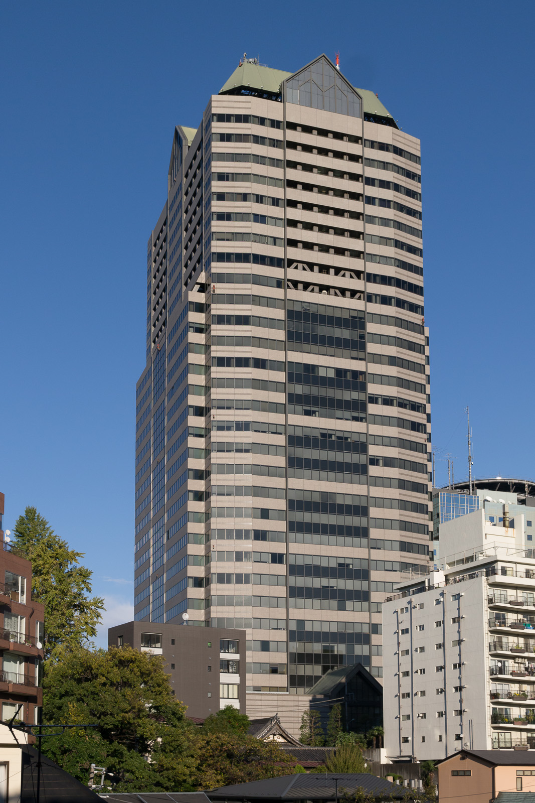 赤坂パークビル/グリーンパーク赤坂、東京都港区赤坂5丁目。